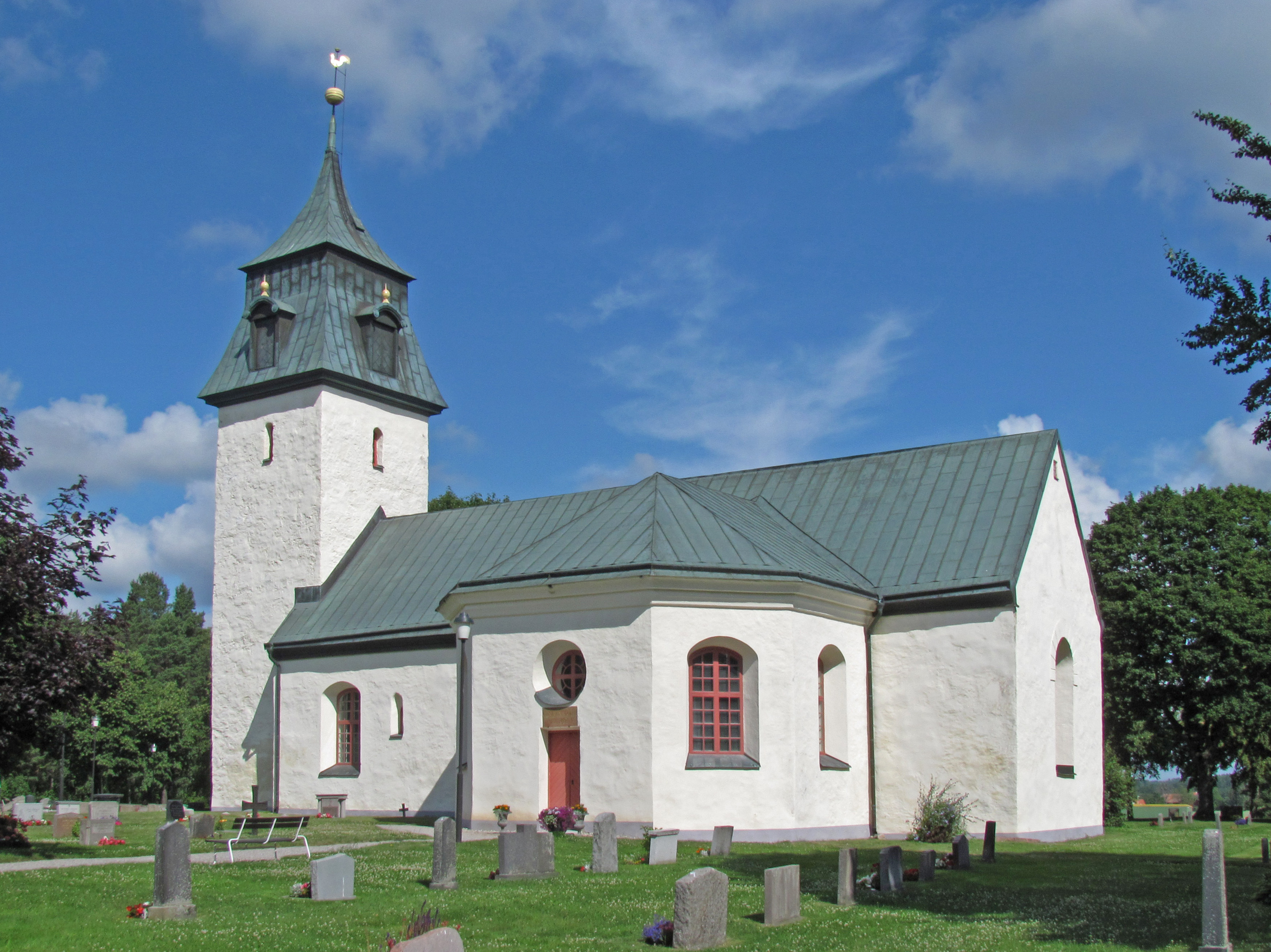 Kjula kyrka